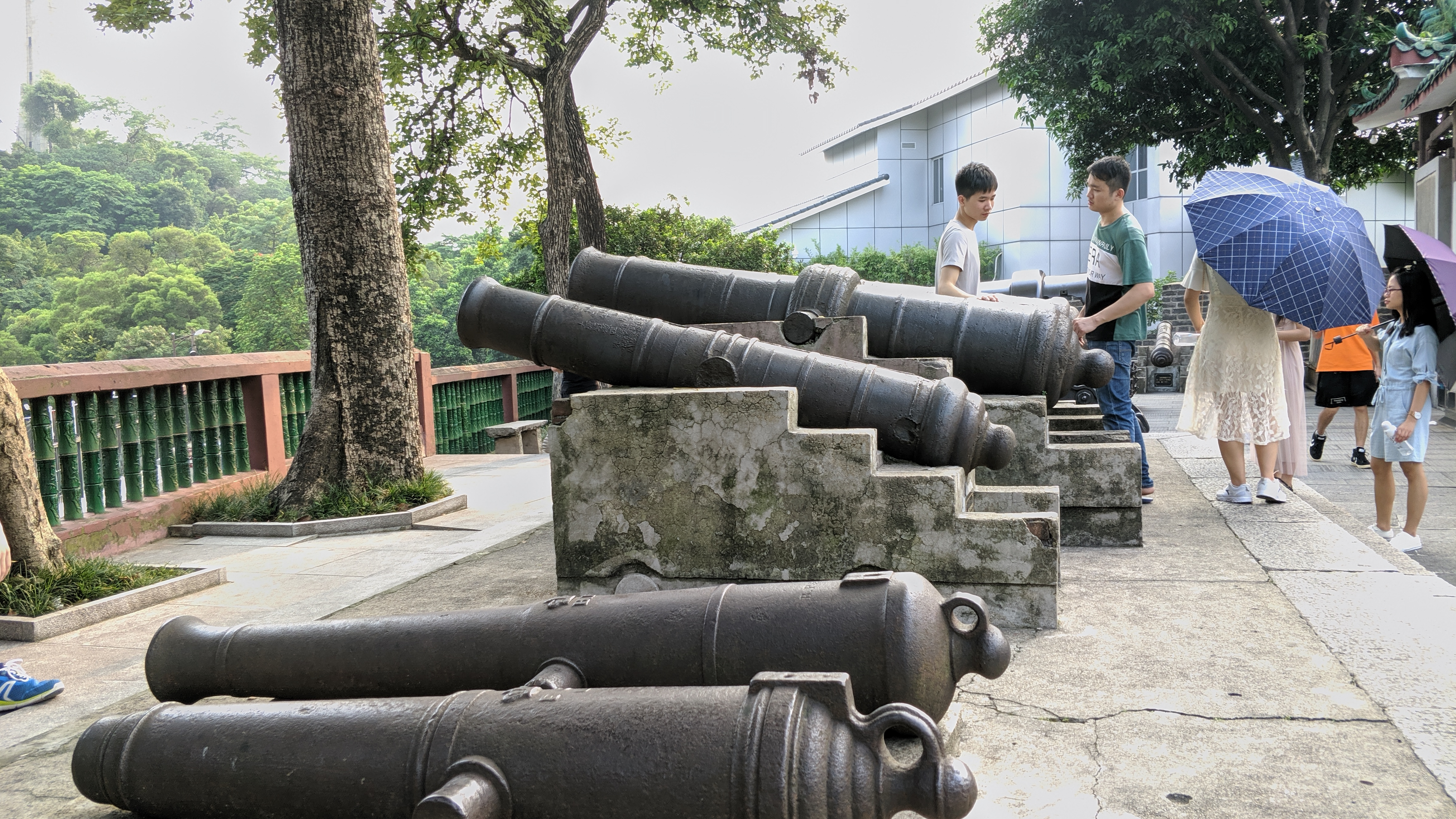 广州市博物馆镇海楼展区晚清炮台